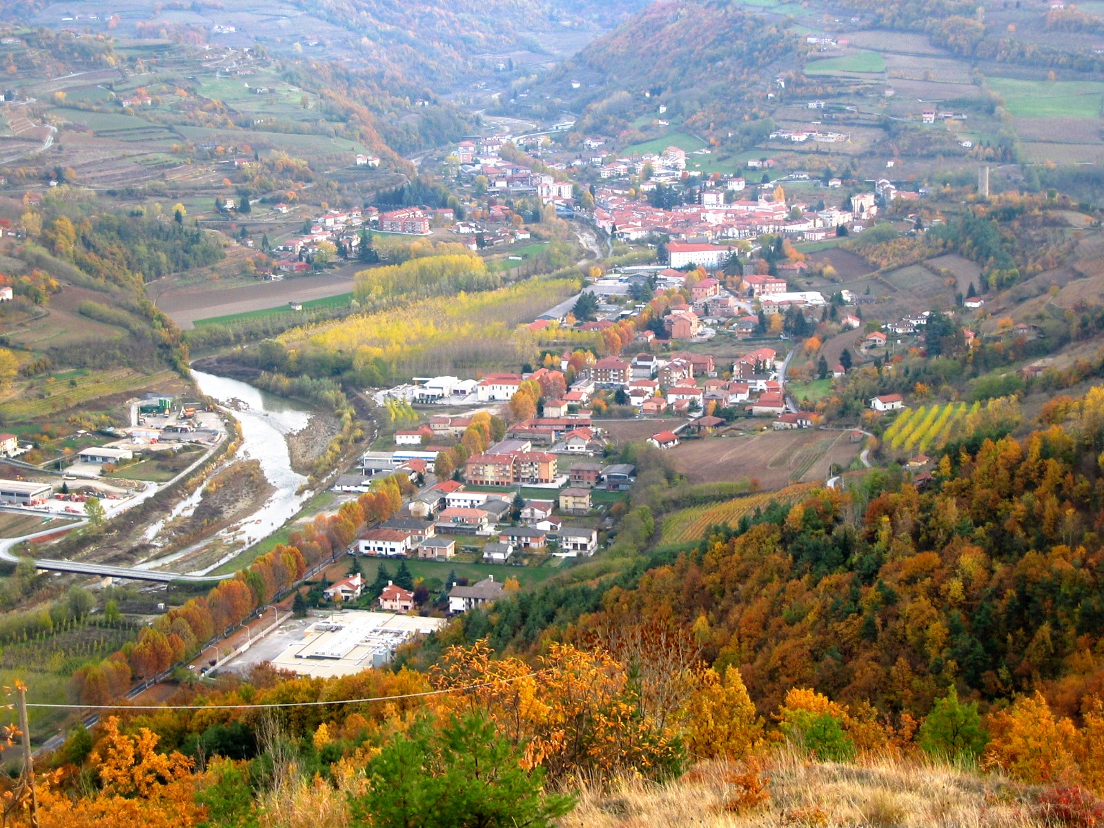 Cortemilia (Cuneo) - Panorama autunnale